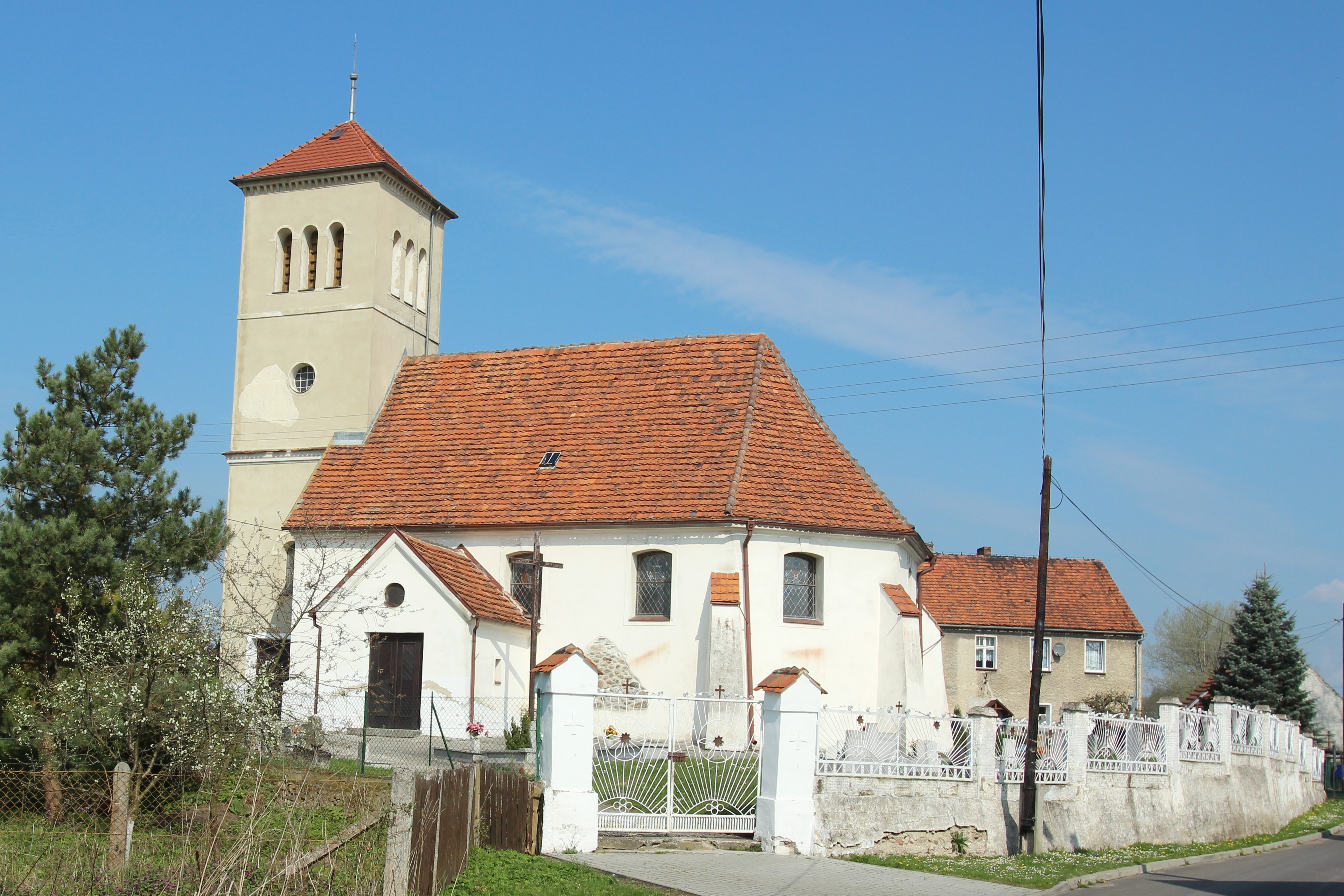 Rynarcice 47a – rzymskokatolicki kościół filialny p.w. św. Mikołaja, 1 poł. XVII, XIX.